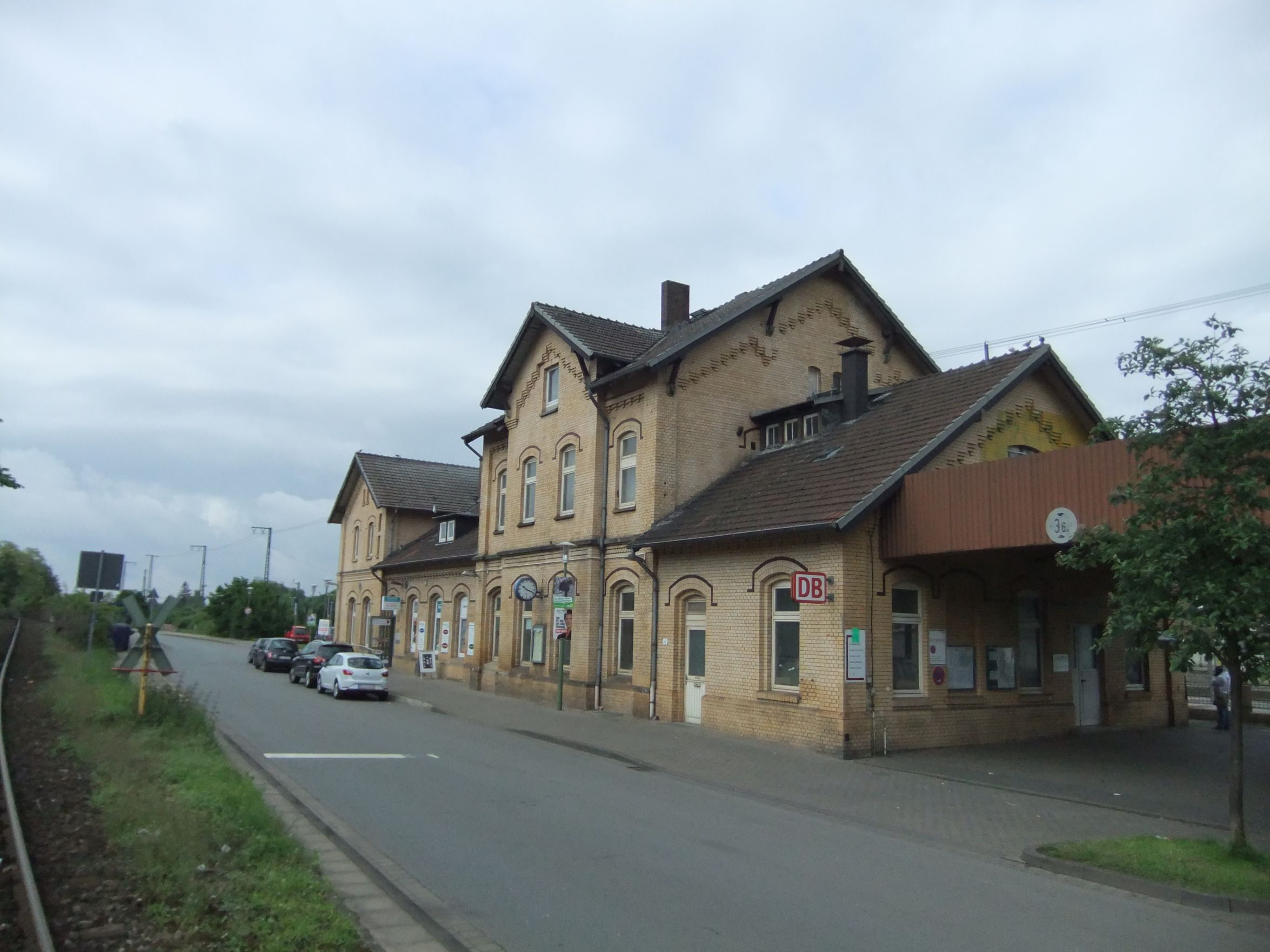 Hauptgebäude des Bahnhofs.